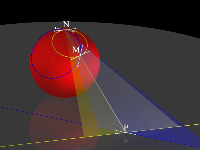 Démonstration géométrique du fait qu'une projection stéréographique est une transformation conforme. Soit M un point de la sphère autre que le pôle nord N et soit deux droites tangentes à la sphère en M. Soient les deux plans passant par N et M, et contenant respectivement chacune des deux droites. Les intersections de ces plans avec le plan de projection sont les images par la projection des deux droites tangentes en M. De plus, ces deux plans découpent dans la sphère deux cercles ayant la corde [NM] en commun et tangents aux deux droites initiales. Considérons les tangentes en N à chacun de ces deux cercles. Elles sont contenues dans chacun des deux plans, et parallèles au plan de projection. Elles sont donc parallèles aux projections des deux droites tangentes en M. L'angle qu'elles forment est donc égal à l'angle entre les deux projections. Mais par ailleurs, du fait de la symétrie des deux cercles par rapport au plan médiateur de [MN], N et les deux tangentes en N sont symétriques de M et des tangentes en M par rapport à ce plan médiateur, donc l'angle entre les tangentes en M est égal à celui entre les tangentes en N. Par conséquent, l'angle entre les deux tangentes en M est le même que celui entre leur projection.